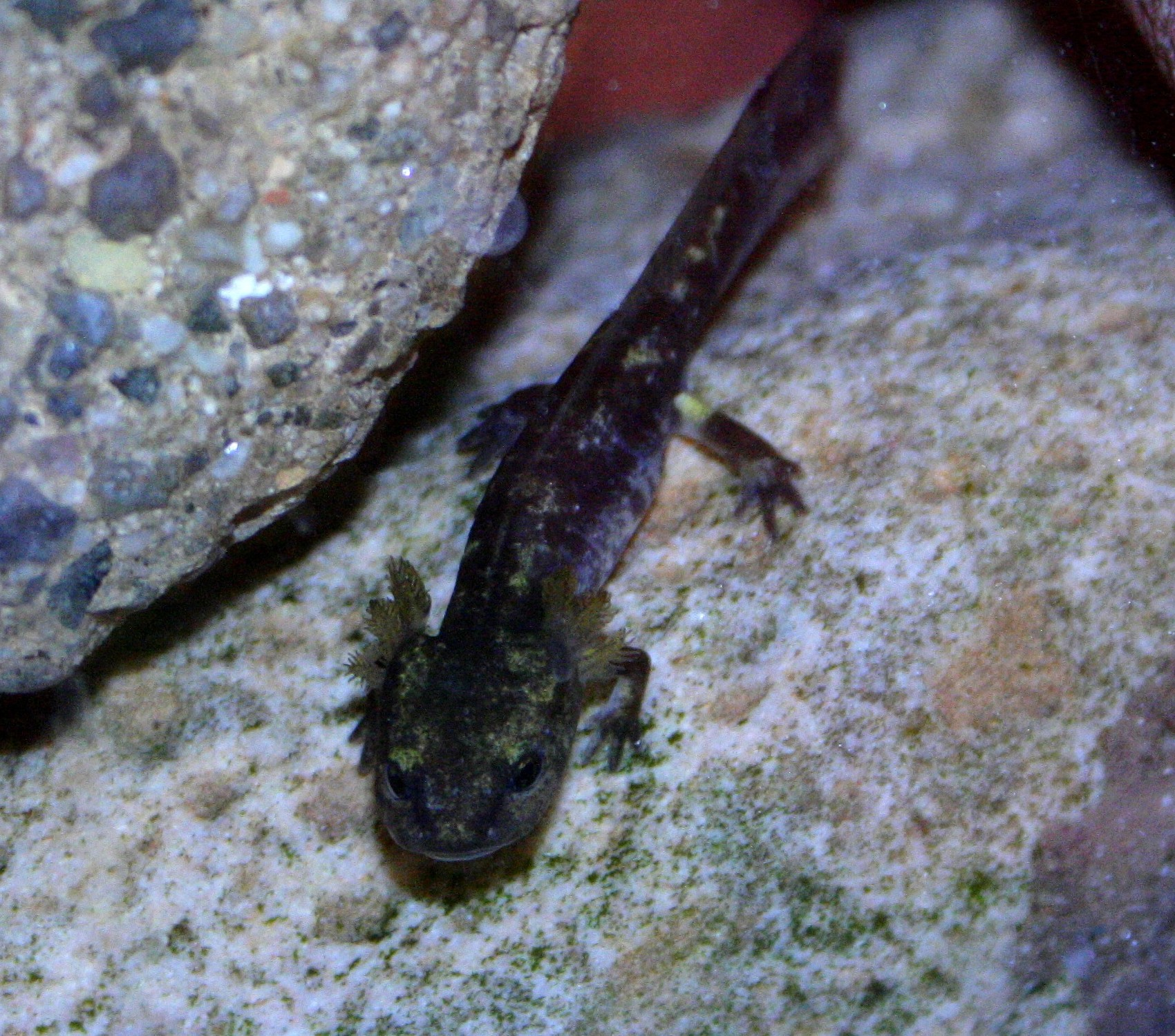 Larve des Feuersalamanders